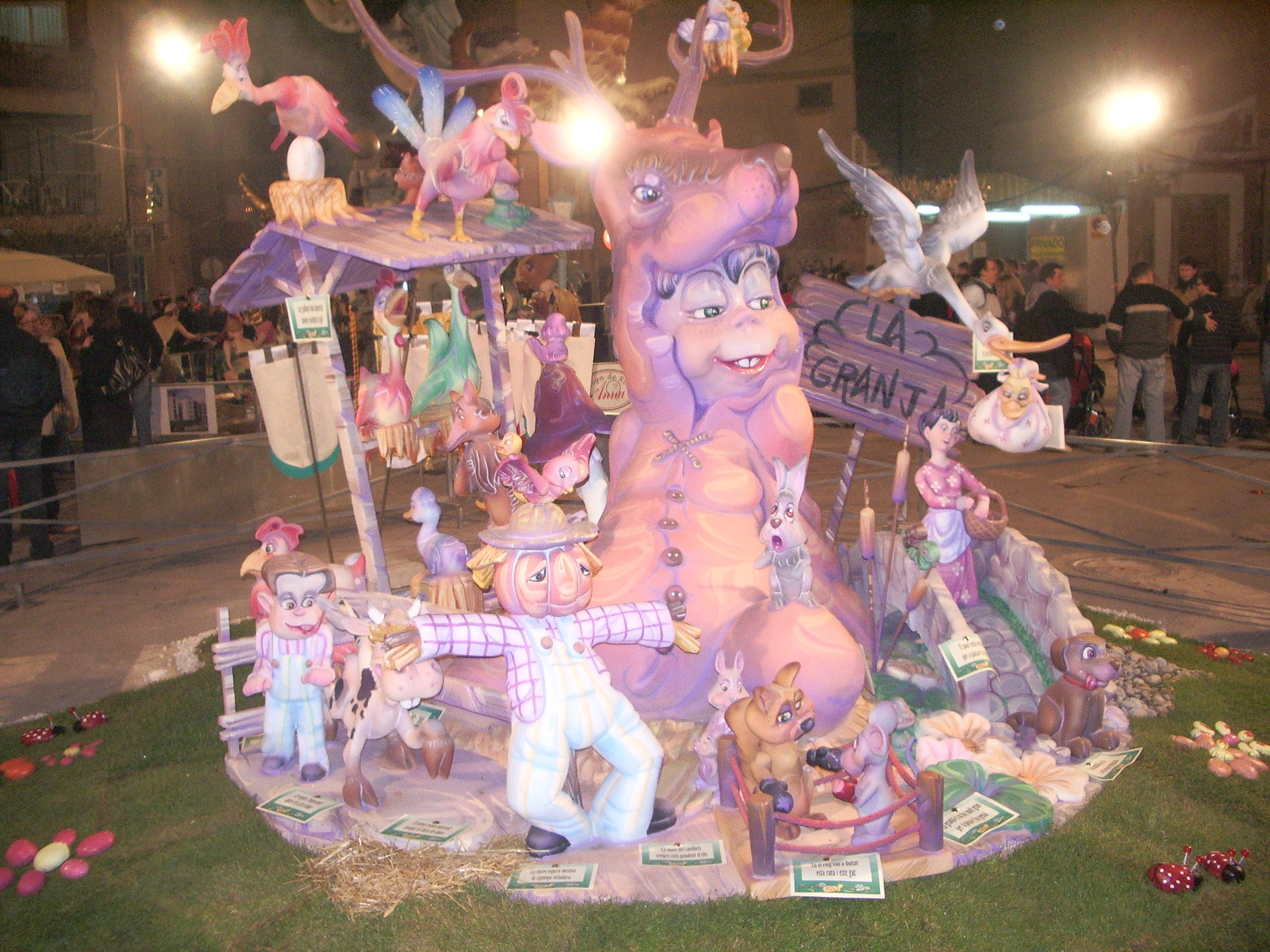 1º Premio Falla Infantil-08